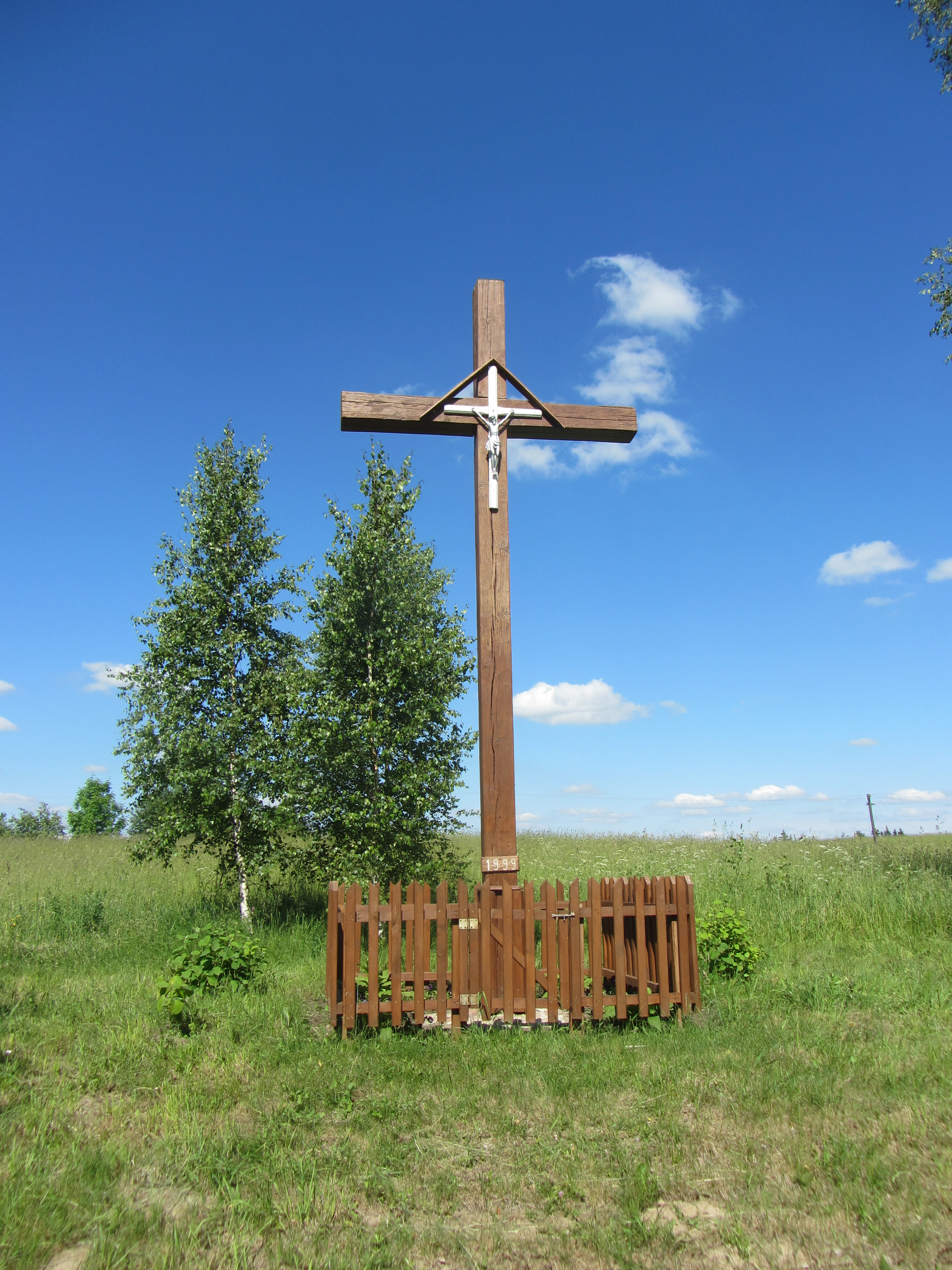 Želva, Lithuania